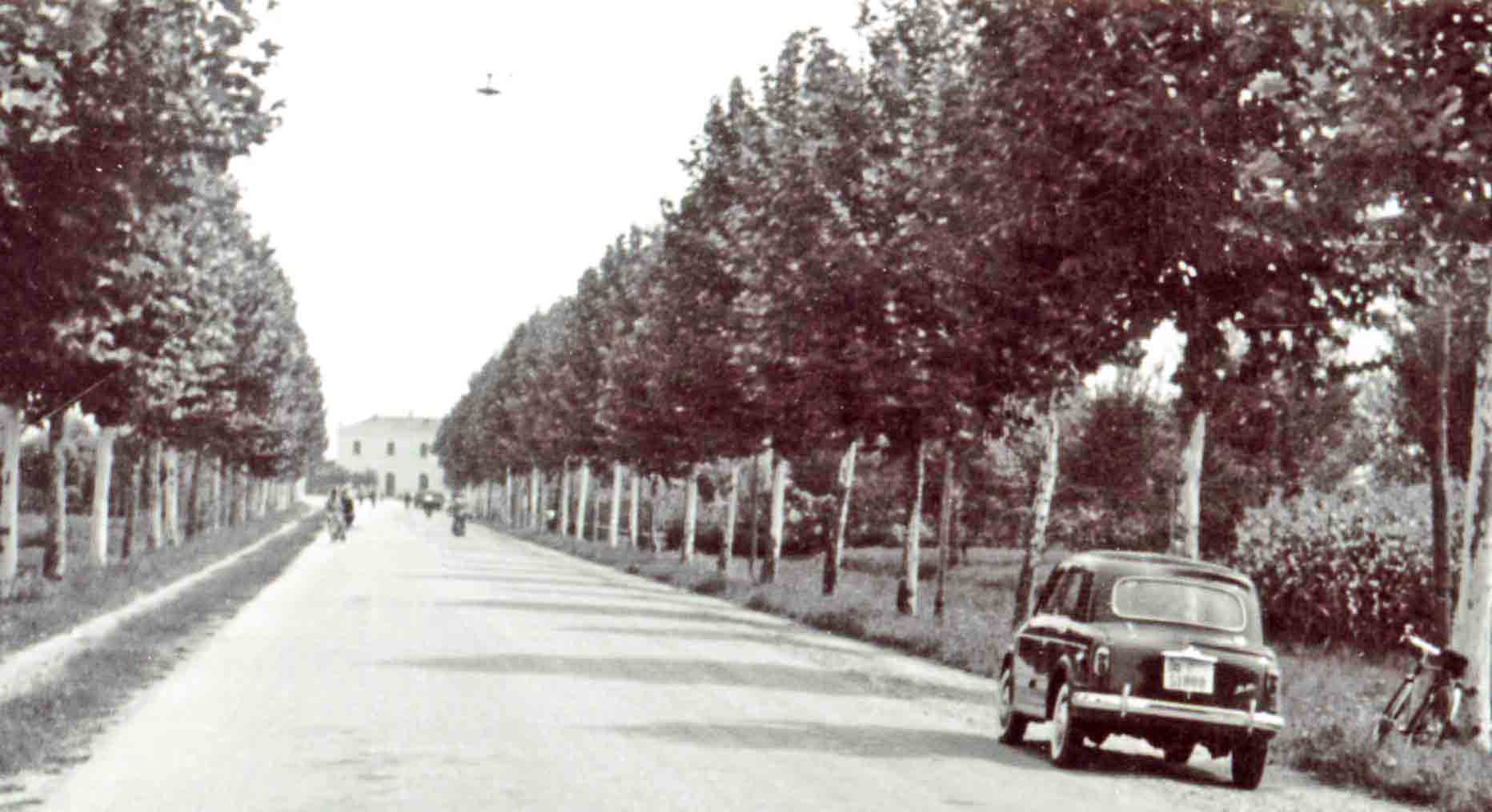 Mirandola - viale stazione primi anni 1950